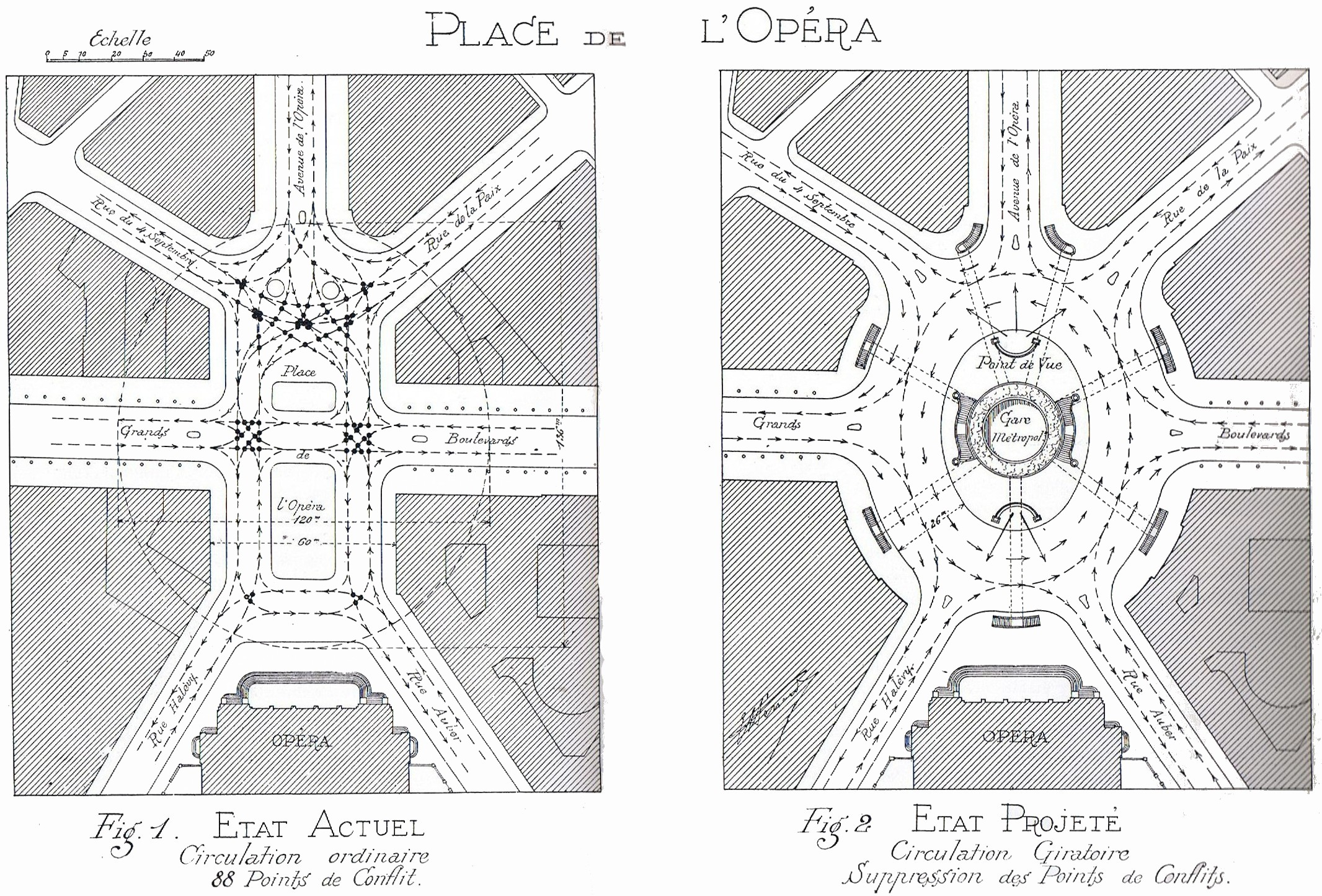 Plan de transformation et ovalisation de la place de l'Opéra.